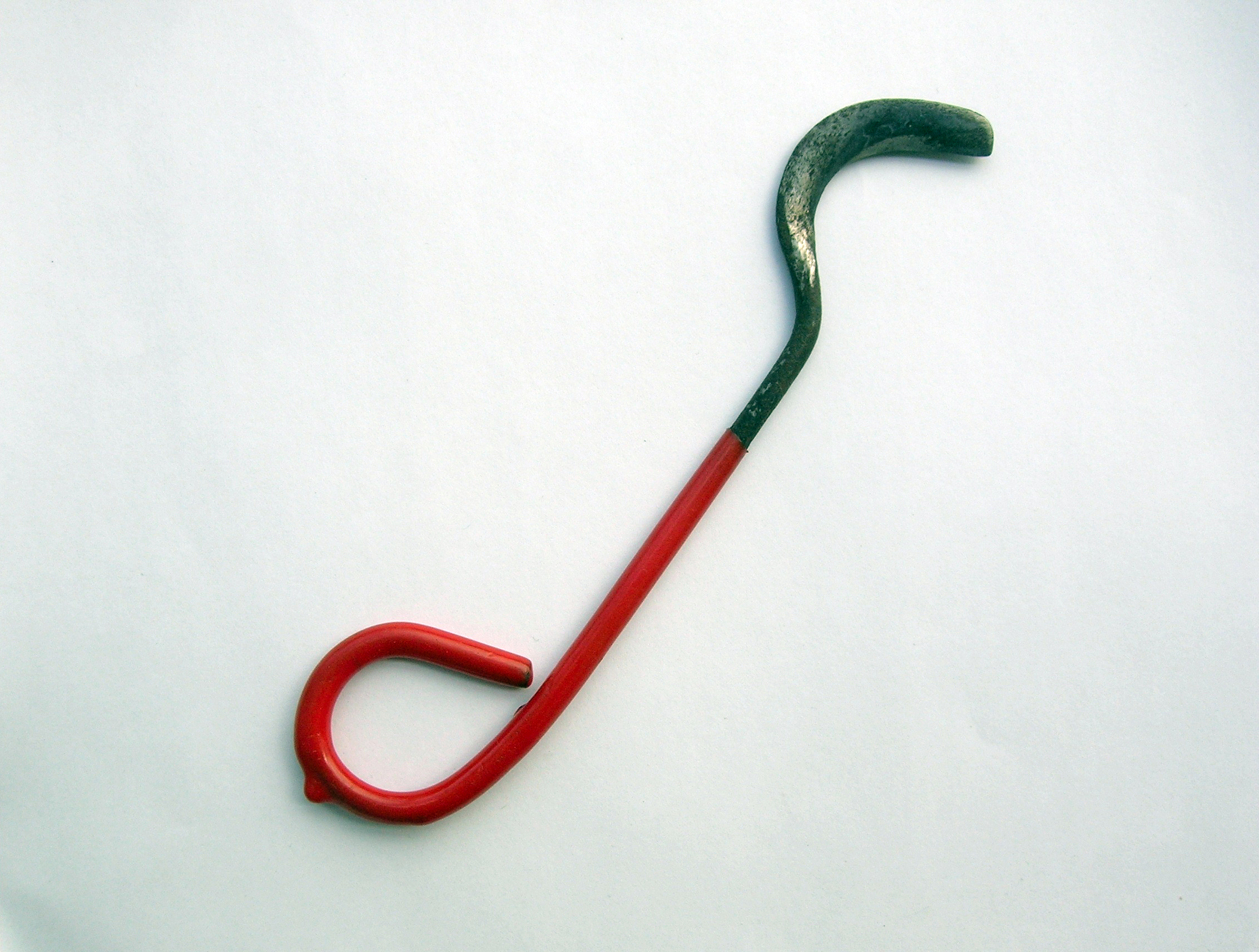 Serpette de vendange, modèle utilisé dans les vendanges du Beaujolais en 2014 et en 2015.